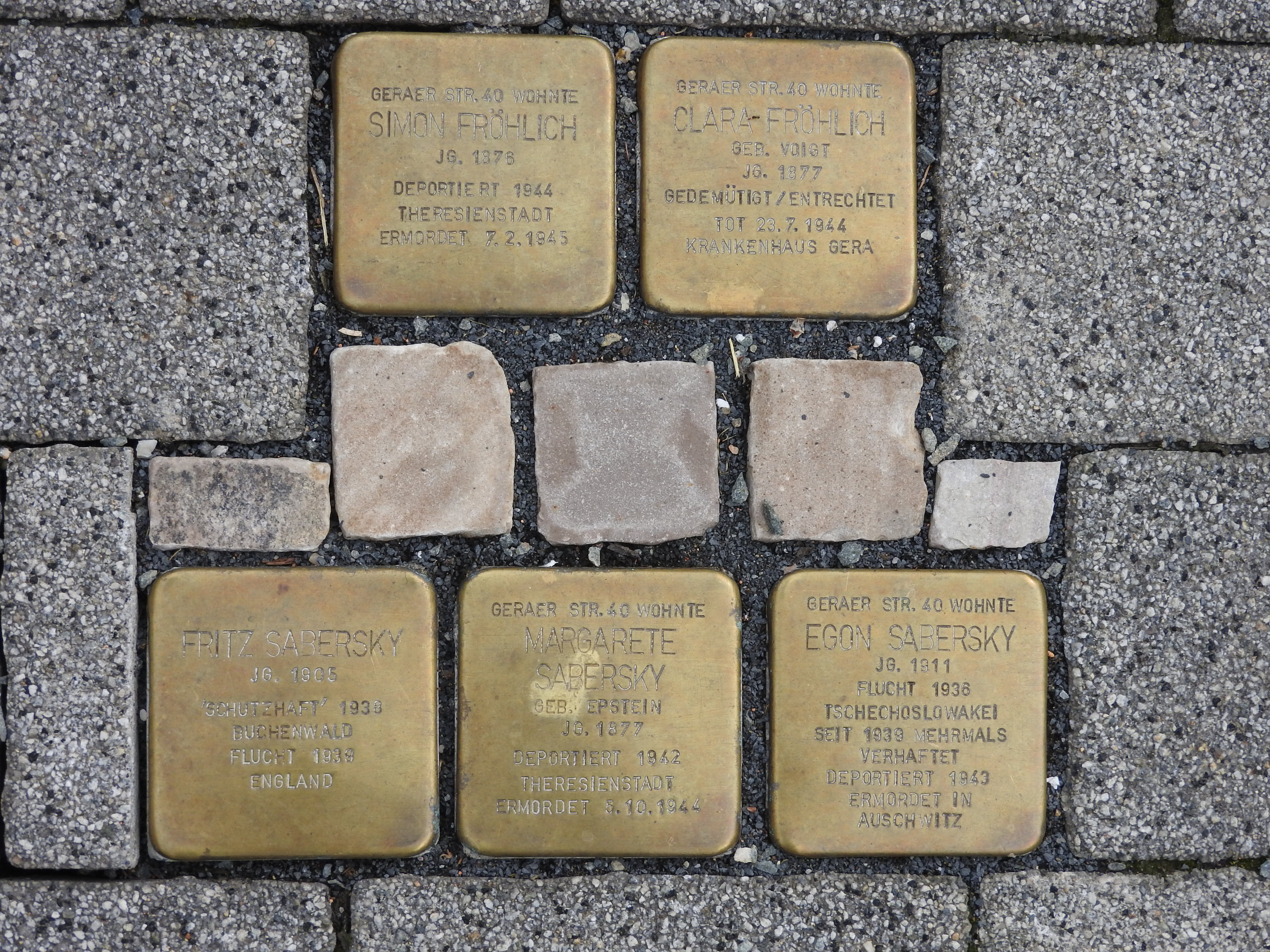 Stolperstein in der Geraer Straße 40 in Weida, Thüringen